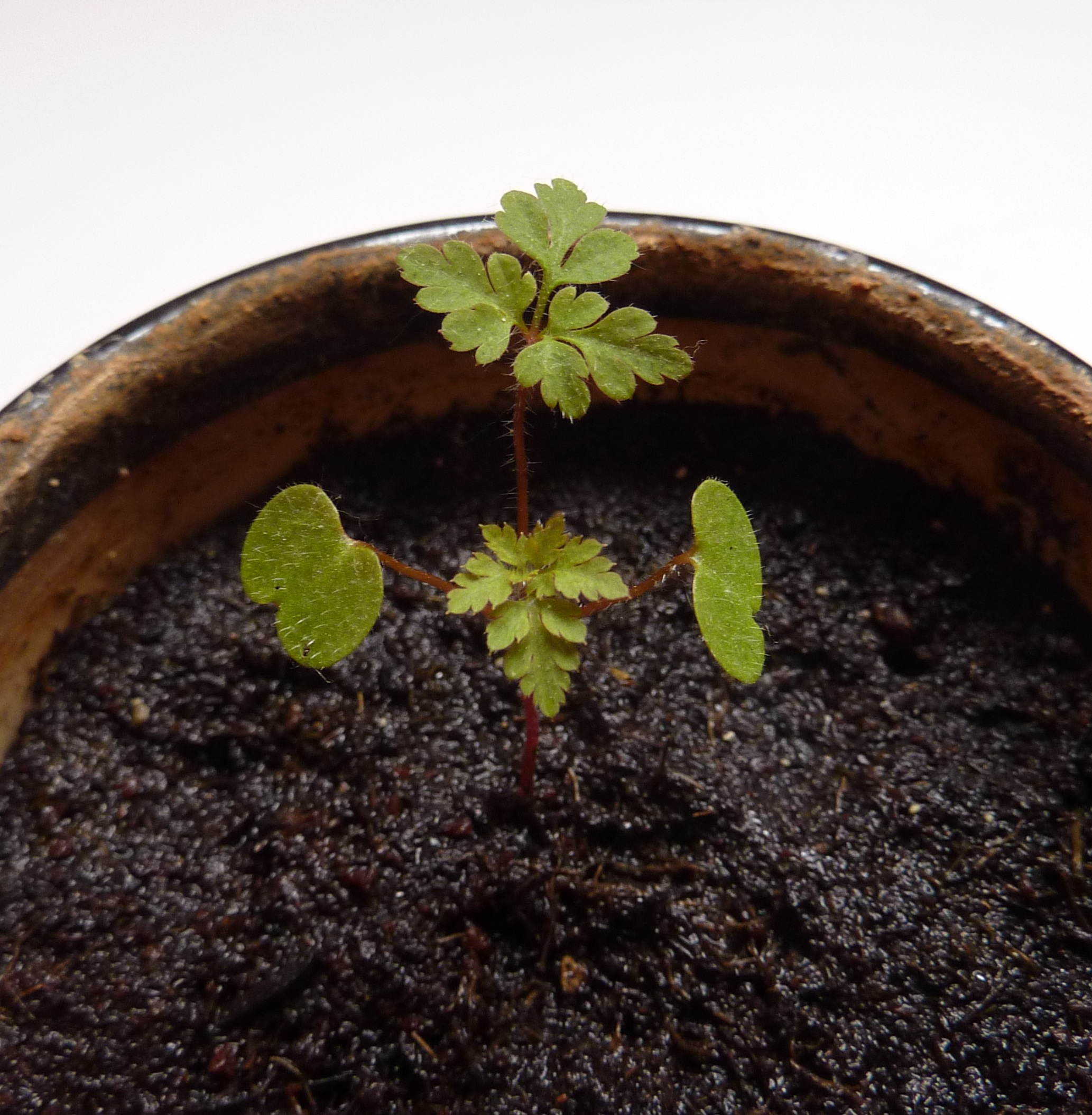 Géranium Herbe à Robert (Geranium robertianum), plantule d'environ trois semaines.